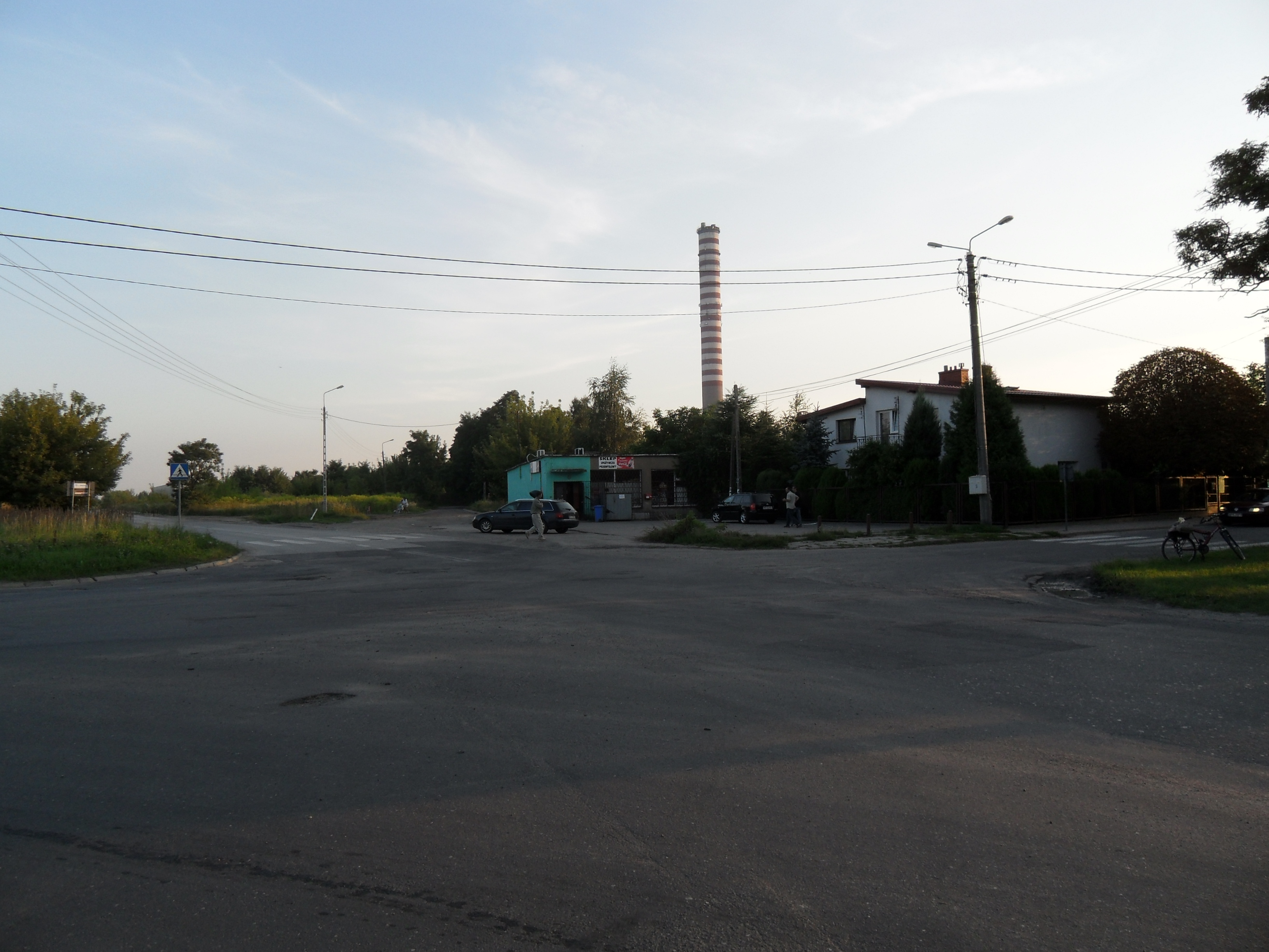 Skrzyżowanie w Mosznach